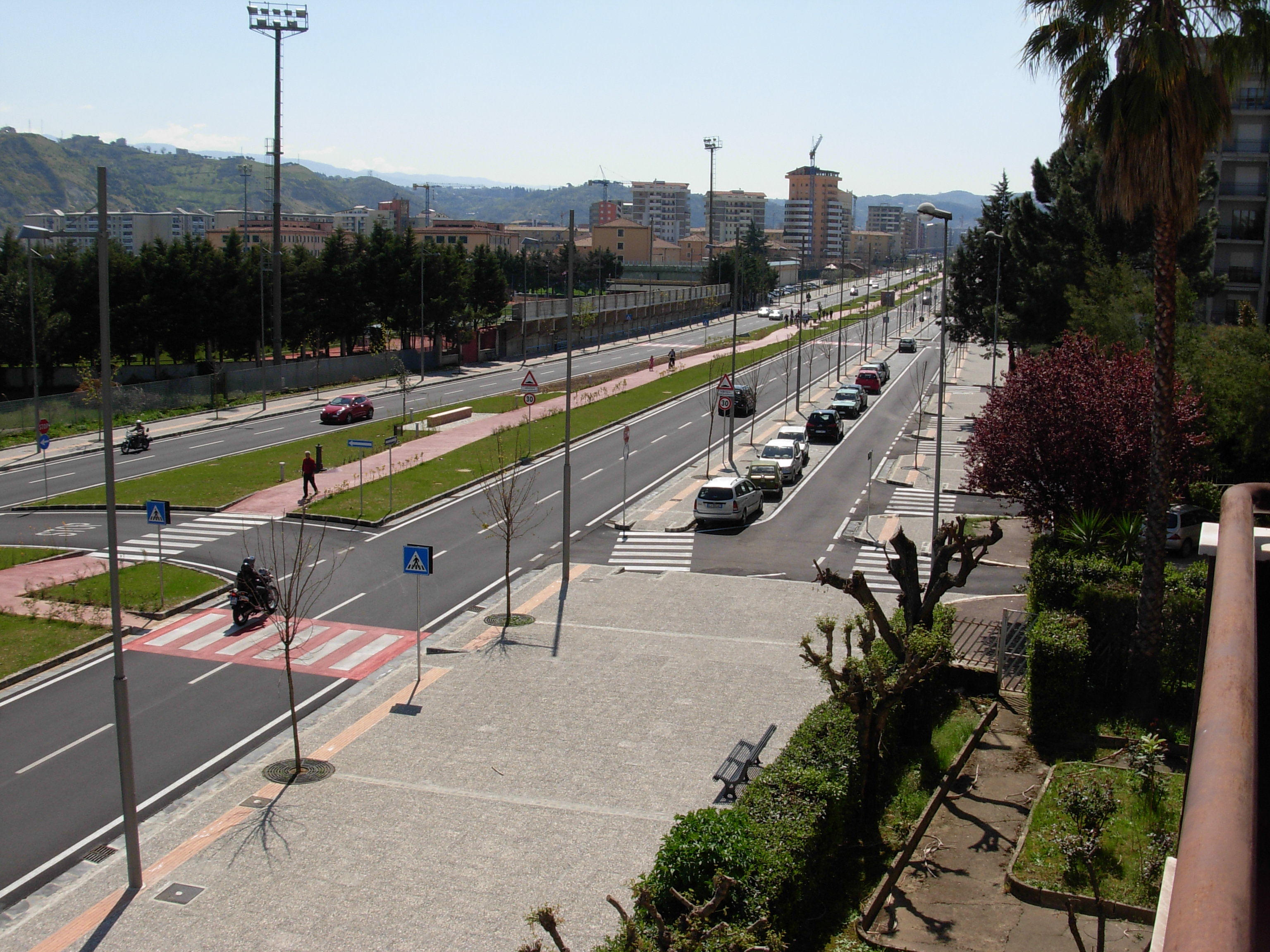 Viale Giacomo Mancini